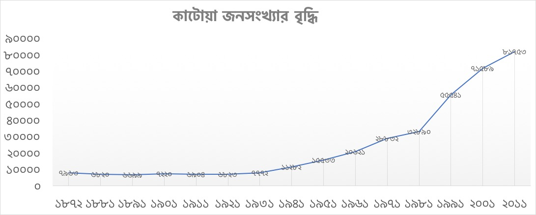 All data taken from 2011 Indian Census Data